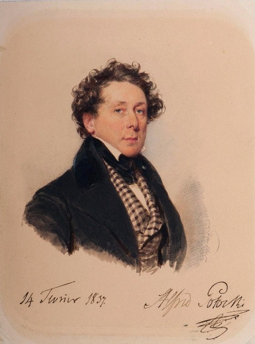 Alfred Potocki (1786-1862)